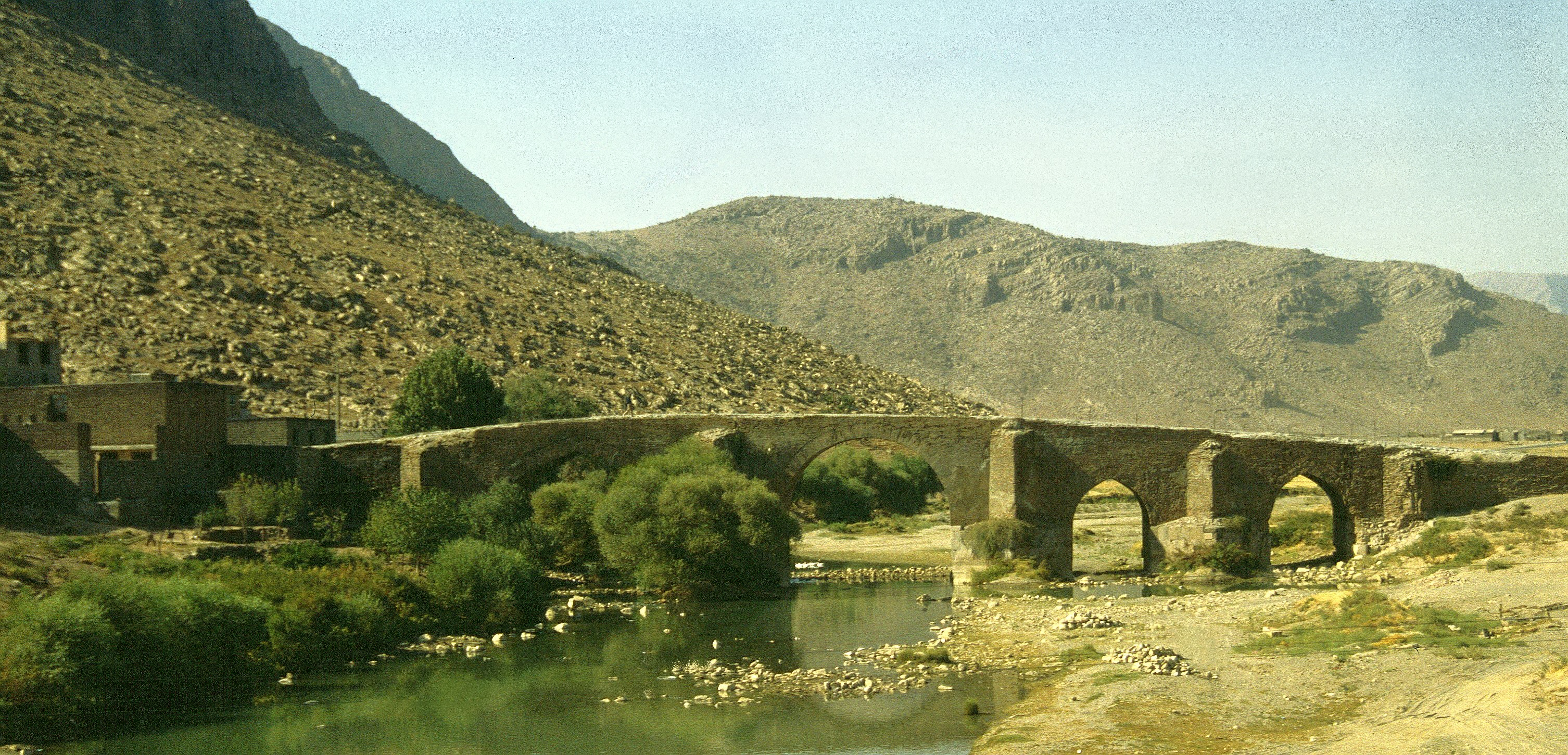 Pole-e Khosrow, Brücke über den Gamasiab